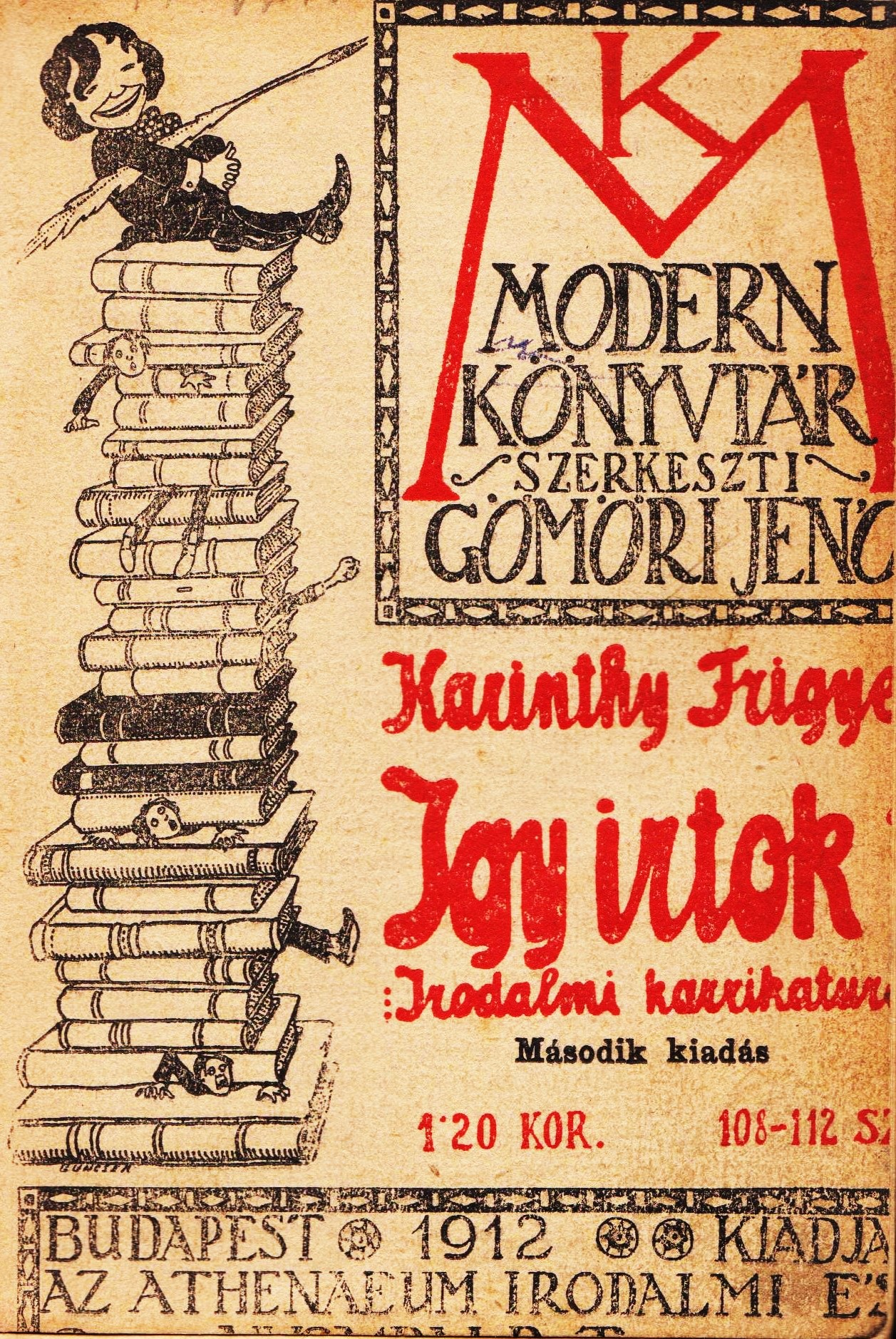 Karinthy Frigyes: Így írtok ti, 1910-es évek, borító